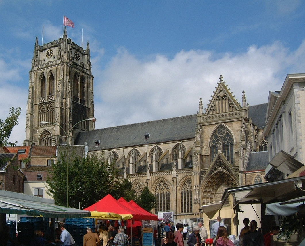 Baslica Tongeren Belgium